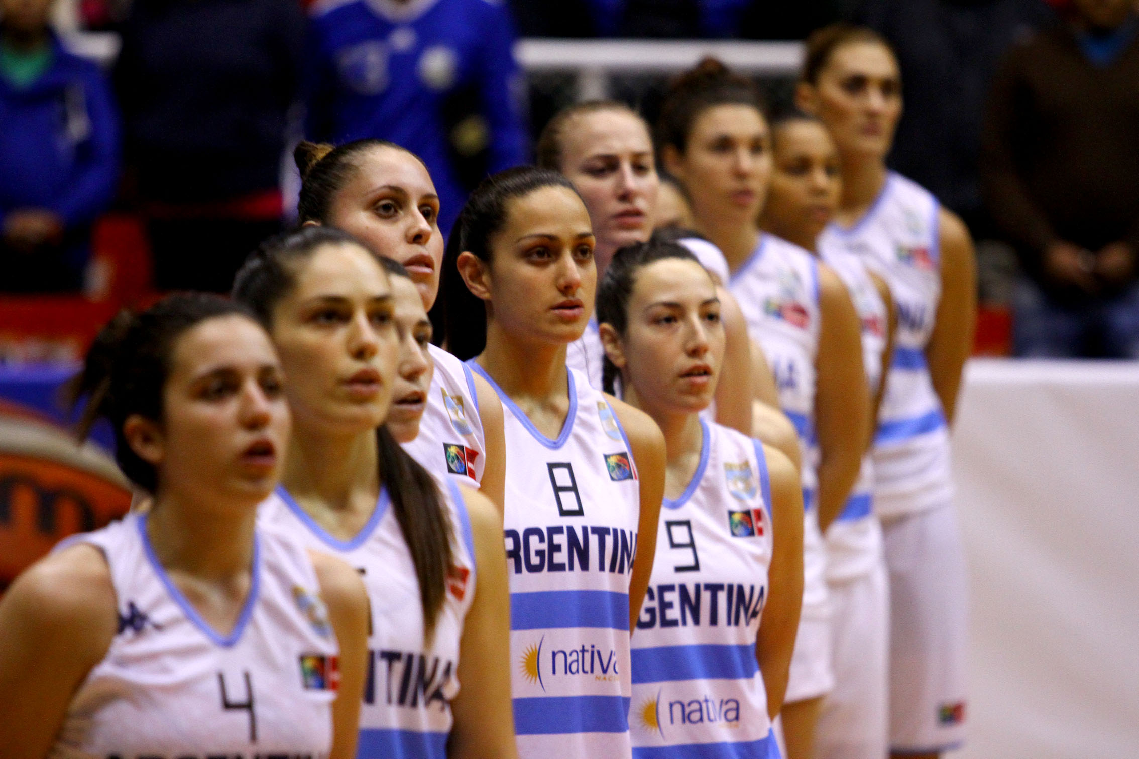 Ambato (Tungurahua) 14 de agosto de 2014 (Andes).- Inició el Campeonato Sudamericano de baloncesto Femenino Ambato 2014. Argentina (blanco) vs Paraguay (celeste).